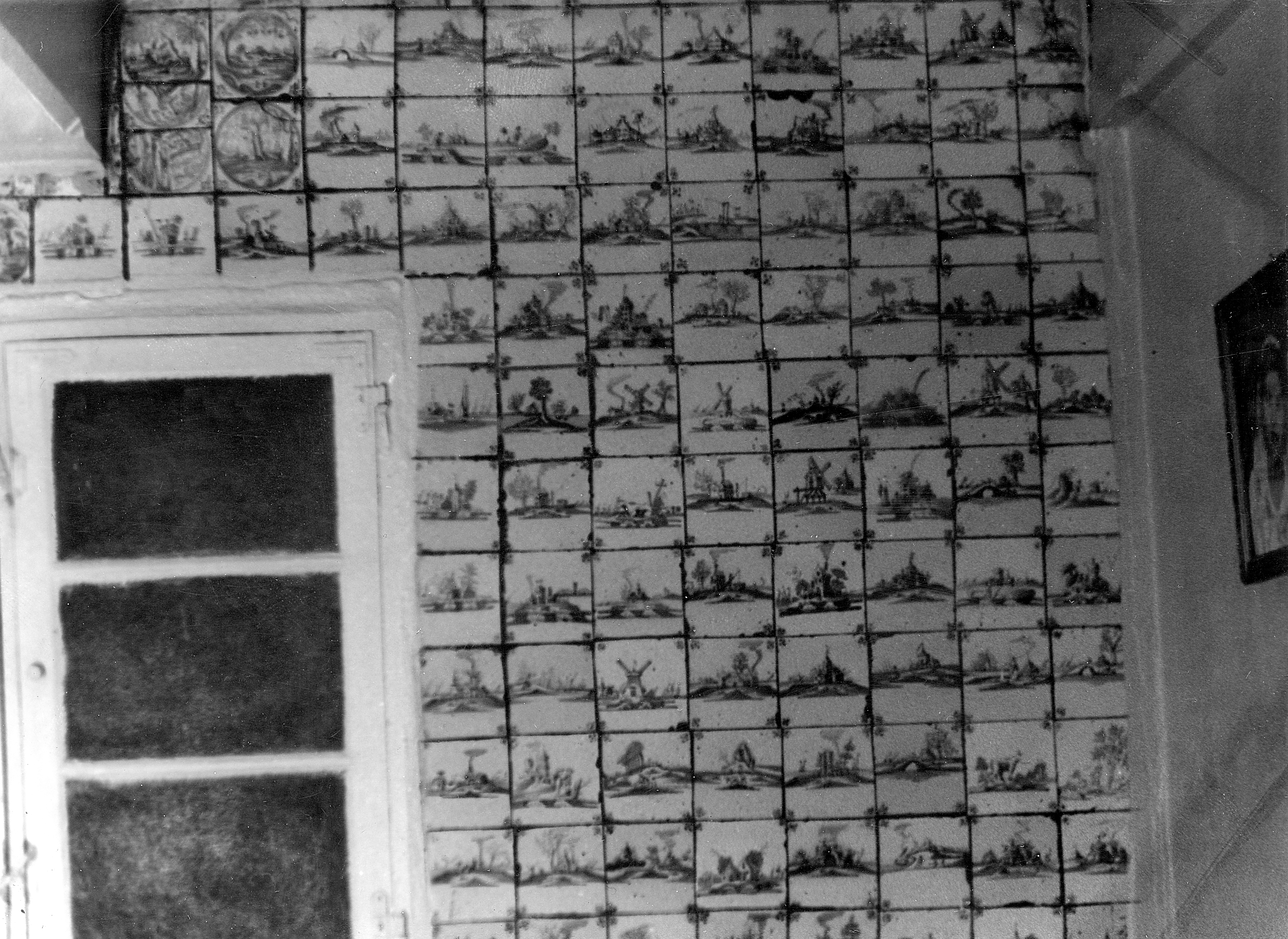 Flizy holenderskie - dom podcieniowy nr 6 w Żuławkach - 1978 r.